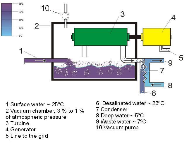 Schema eines offenen Meereswärmekraftwerk; selbst gezeichnet